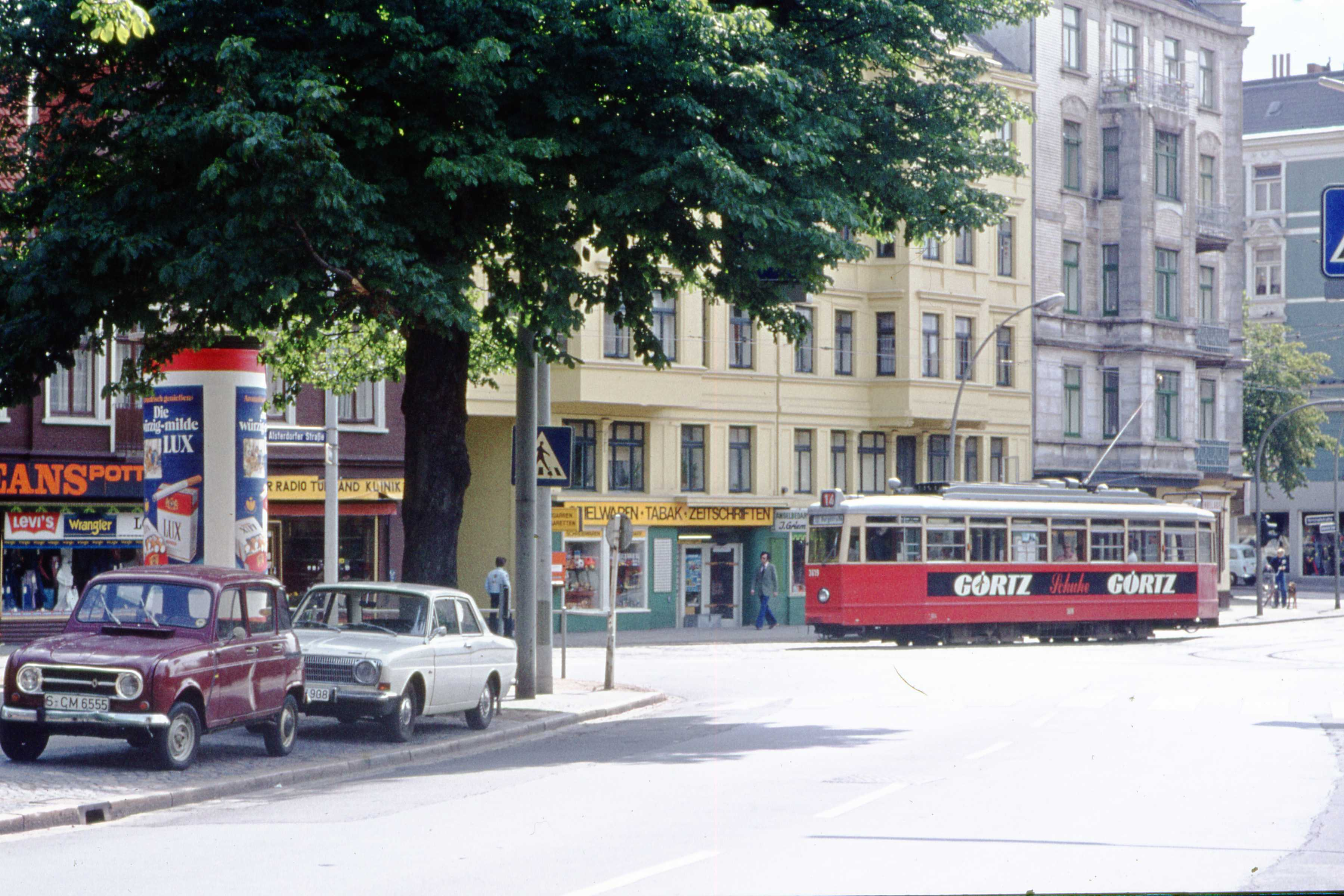 Straßenbahn mit Werbung für „Schuhe Görtz“ in der Alsterdorfer Straße, bei der Einmündung Lattenkamp.